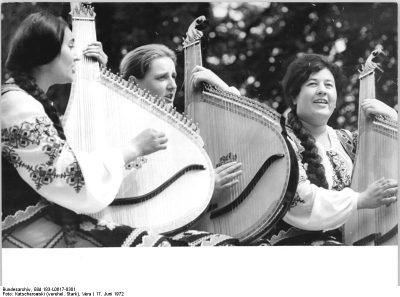 Schwerin, 14. Arbeiterfestspiele, ukrainische Musikgruppe ADN-ZB Katscherowski 17.6.72 Schwerin: 14. Arbeiterfestspiele- Diese ukrainischen Volkskünstlerinnen wirken im Estradenprogramm mit Liedern und Tänzen mit, das ein Zentrales Volkskunstensemble der sowjetischen Gewerkschaften zu den 14. Arbeiterfestspielen mitbrachte. Die Sänger und Tänzer aus dem Bruderland traten u.a. am 16.6.72 im Schweriner Schloßgarten auf.